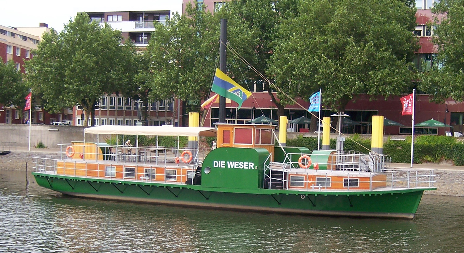 Nachbau des Dampfschiffes Die Weser von 1817 in Bremen